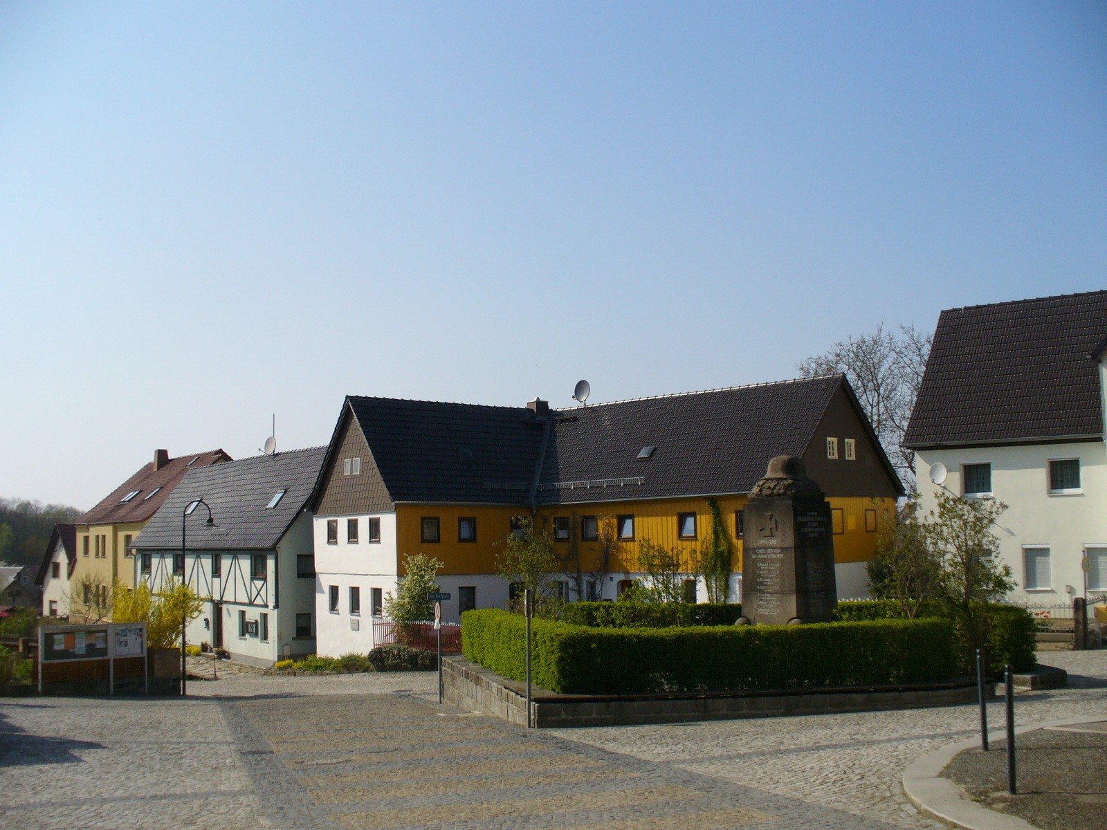 Göda, Marktplatz